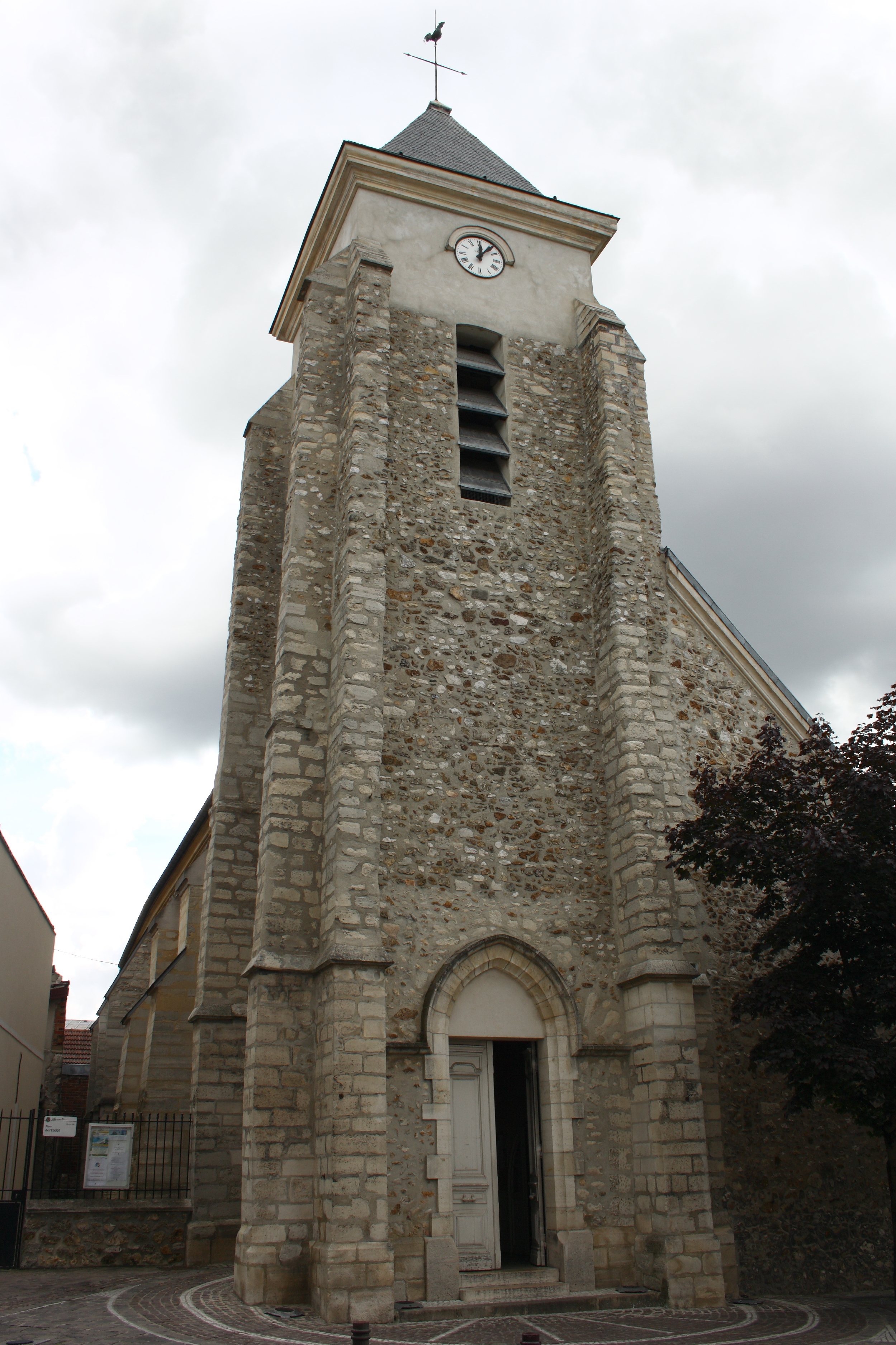 katholische Pfarrkirche Saint-Jacques-Saint-Christophe in Villiers-sur-Marne im Département Val-de-Marne (Île-de-France)